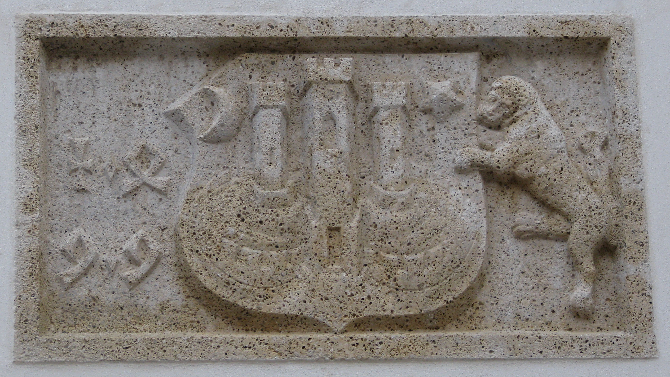 Najstariji poznati grb grada Zagreba ukles na sjeverozapadnom dijelu Crkve sv. Marka